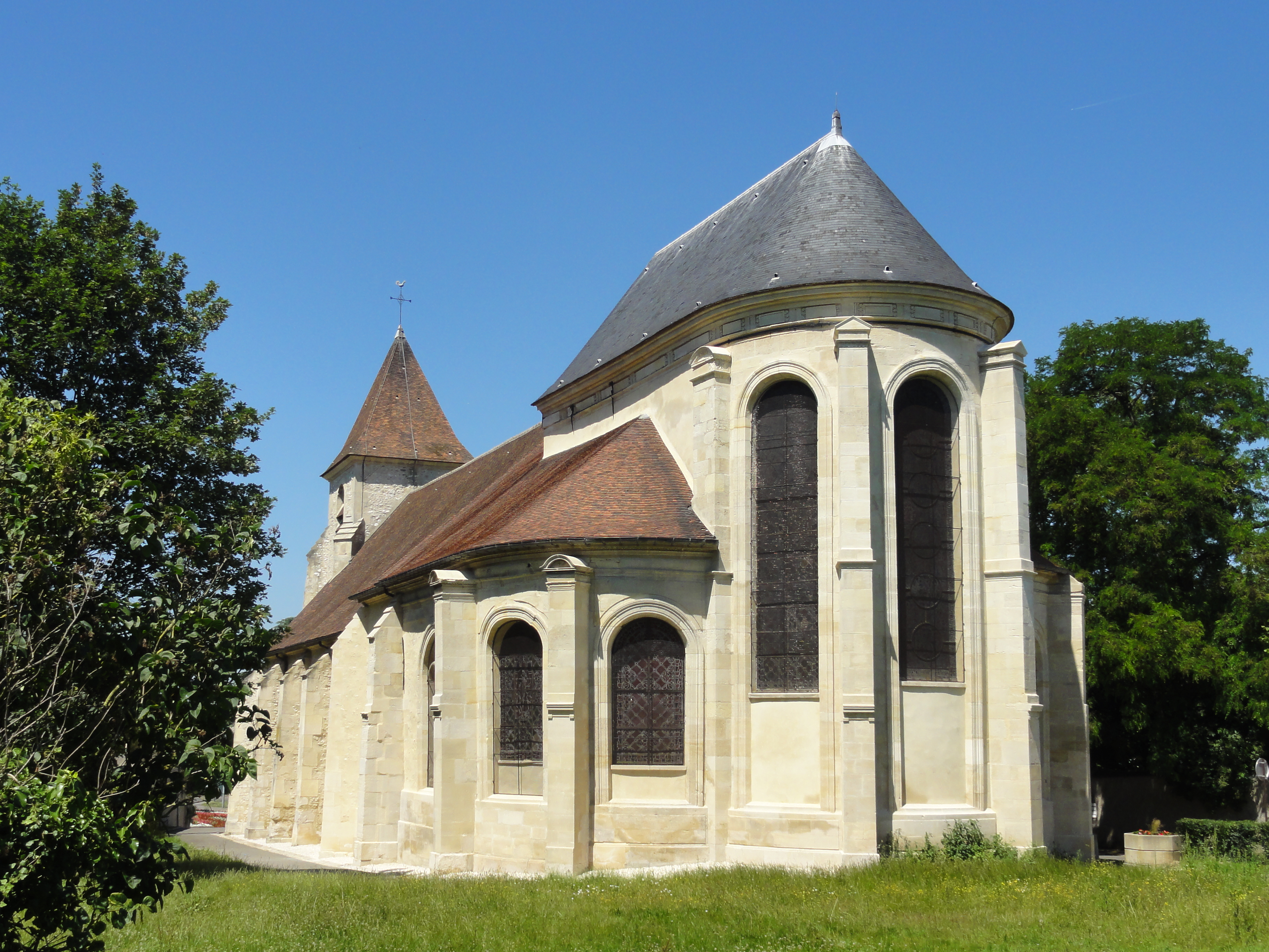 Vue depuis le sud-est.